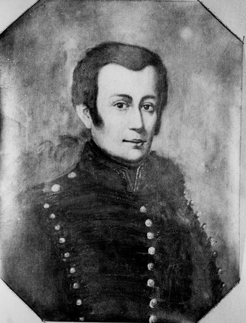 José Miguel Carrera (1786 - 1821)